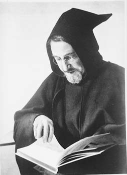 Euskal musikariak. Gonzalo Zulaika (Aita Donostia)